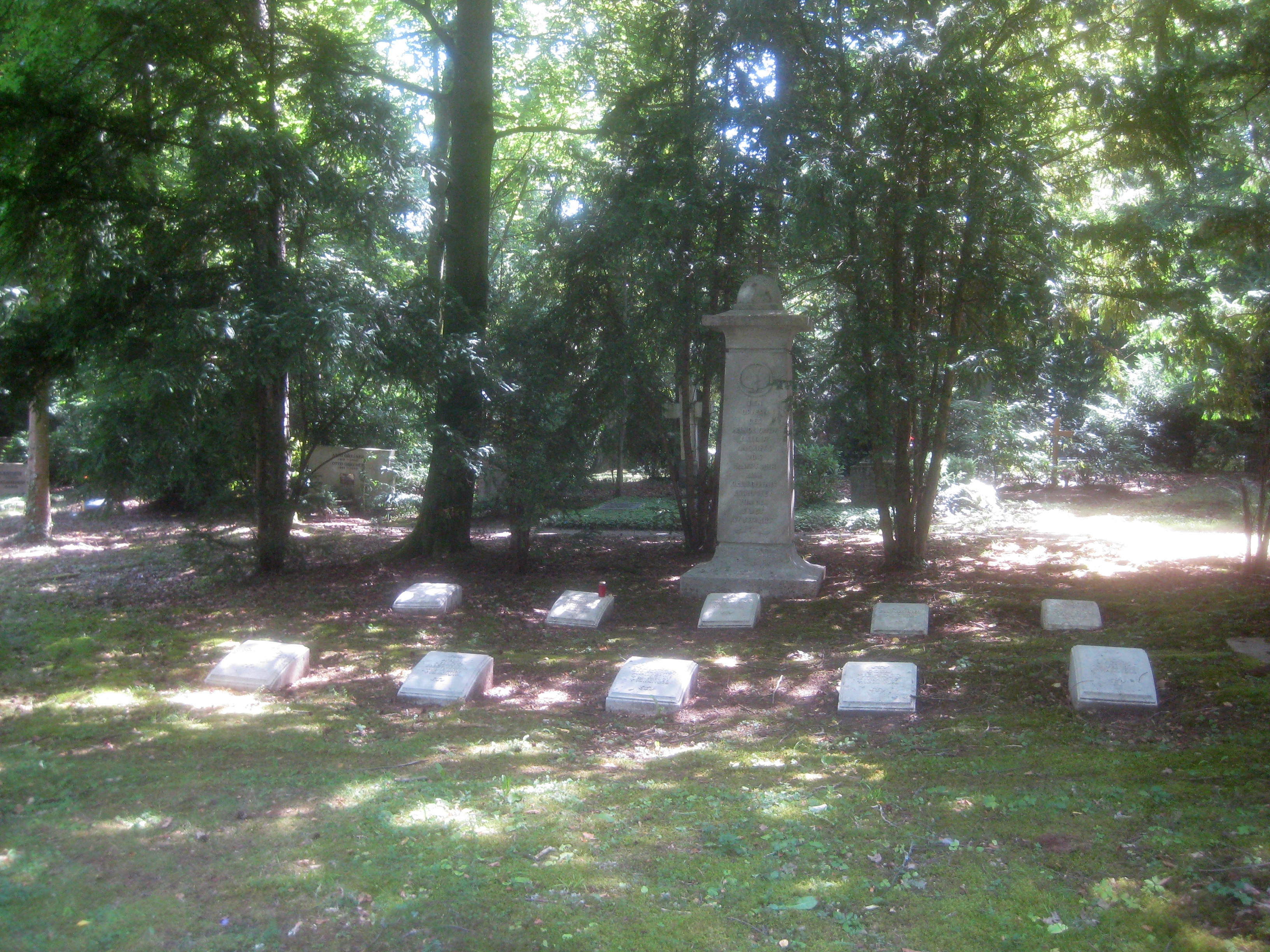 Waldfriedhof in Stuttgart, Ehrenmal für die Opfer des Fliegerangriffs vom 5. September 1918.